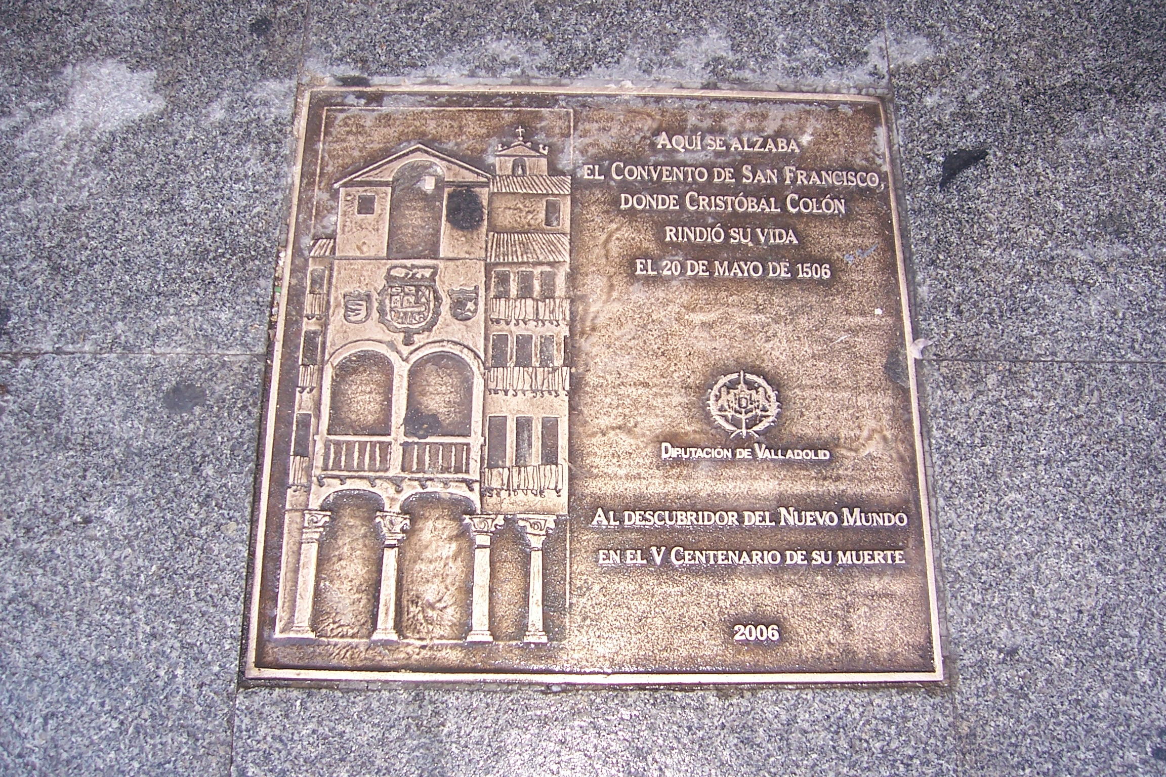 Placa en homenaje a Colón en su V Centenario. Está puesta en la pared de un moderno edificio que ocupa el lugar donde antaño estuvo el convento de franciscanos.